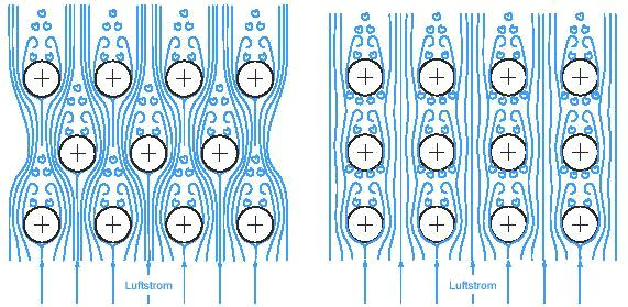 Rohranordnungen: rechts hintereinander, links versetzt